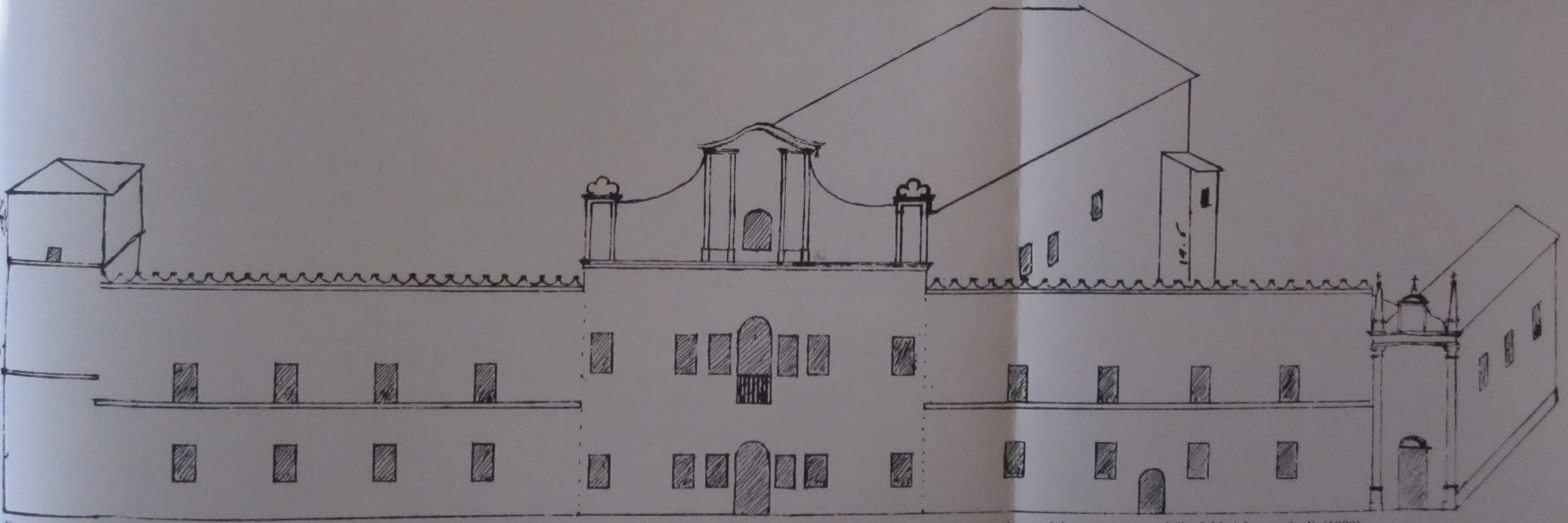 Planimetria, ovvero come si presentava nel 1809 il Monastero di Santa Croce di Salara